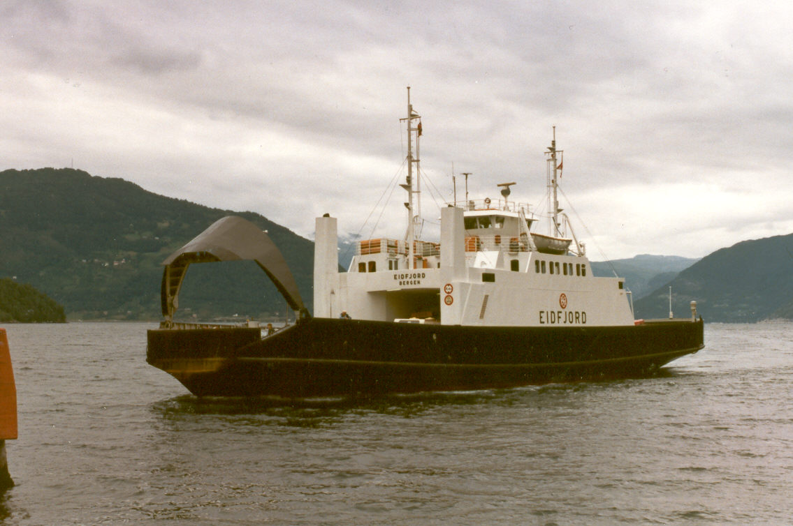 M/F Eidfjord, built 1975.